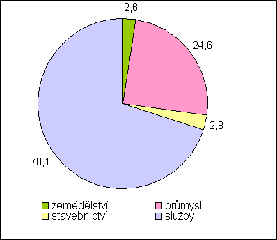 Podíl sektorů na HDP Podíl sektorů na tvorbě HDP, v procentech, stav 2001 Sektory: zemědělství, průmysl, stavebnictví, služby